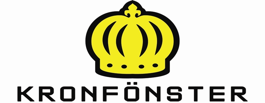 Kronfönster logga